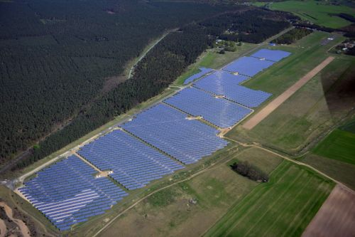 EGGERSDORF 04.05.20132 Blick auf den Solarenergiepark / Solarpark / Solarkraftwerk der juwi solar GmbH am Flugplatz Eggersdorf bei Müncheberg im Bundesland Brandenburg. // View at the of the solar energy park at the airport Eggersdorf in Brandenburg. /